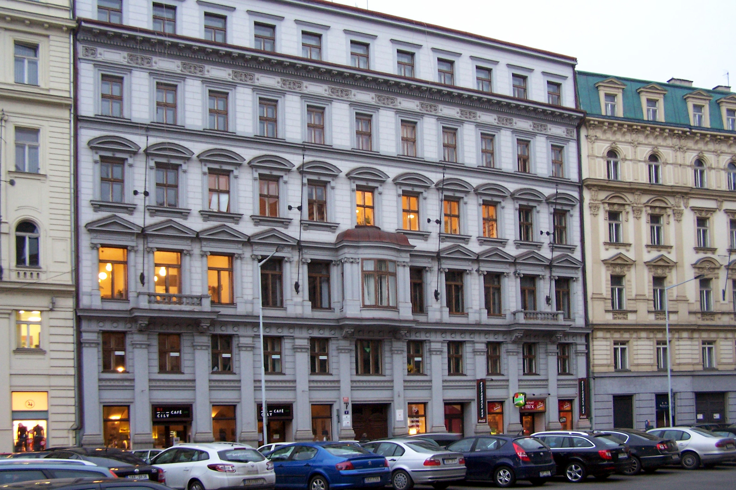 Sídlo knihovny Libri prohibiti na pražském Senovážném náměstí.